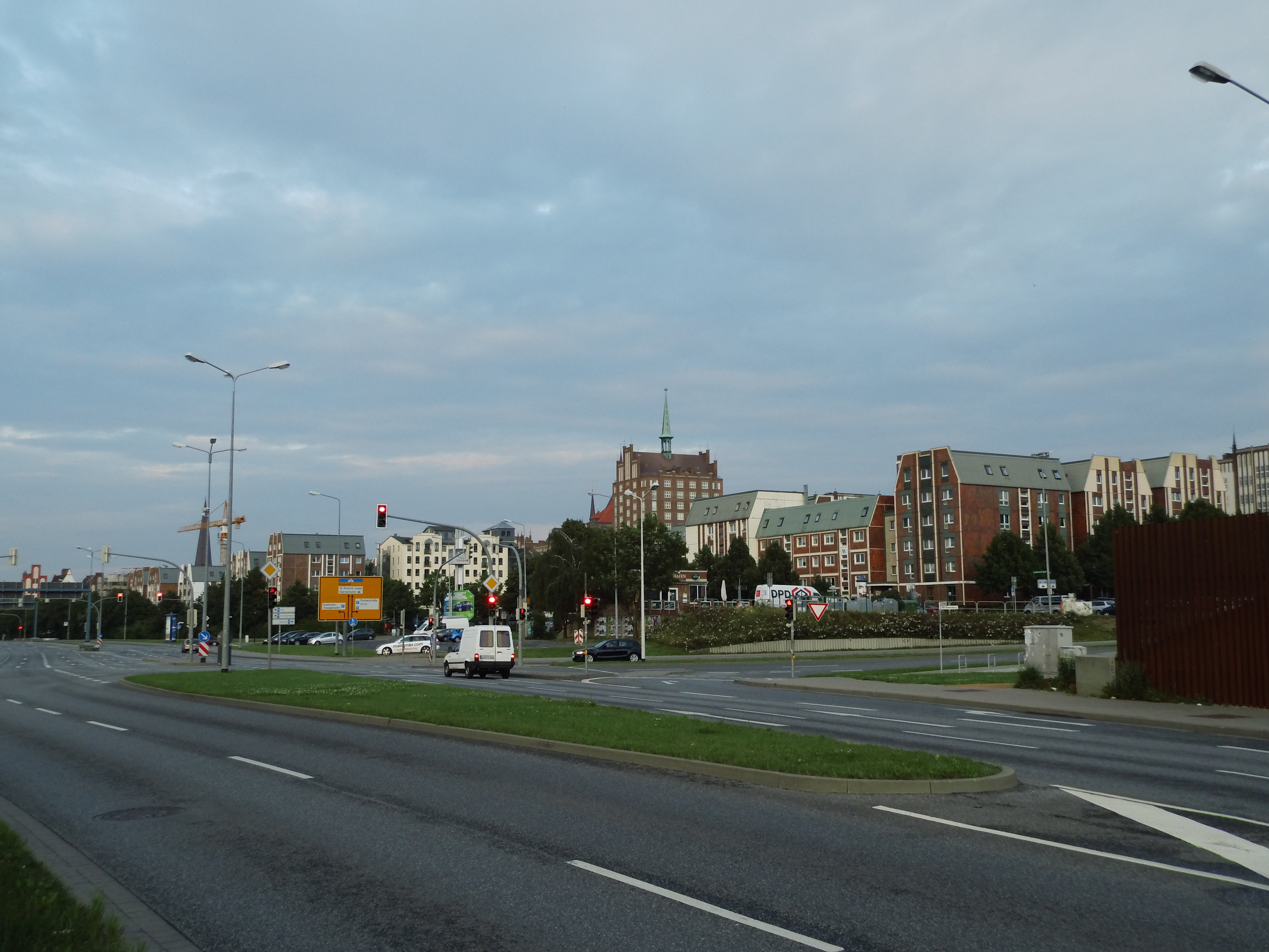 Die nördliche Rostocker Altstadt, vom Stadthafen aus fotografiert